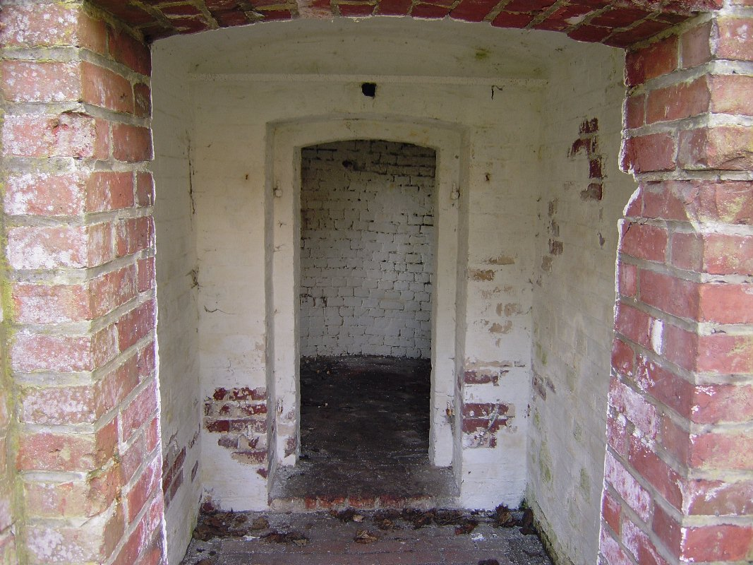 Eingangschleuse eines Eiskellers